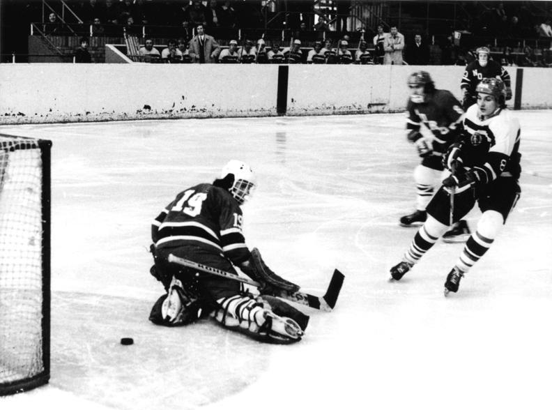 ADN-ZB/Koard/17.3.74/ Berlin: Eishockey/ Mit 6:2 gewann die DDR am 17.3.1974 das Eishockey-Länderspiel gegen Norwegen. Bei dem Spiel im Berliner Sportforum schoß Nickel (vorn rechts) das dritte Tor für die DDR - links der norwegische Torwart Goldstein.